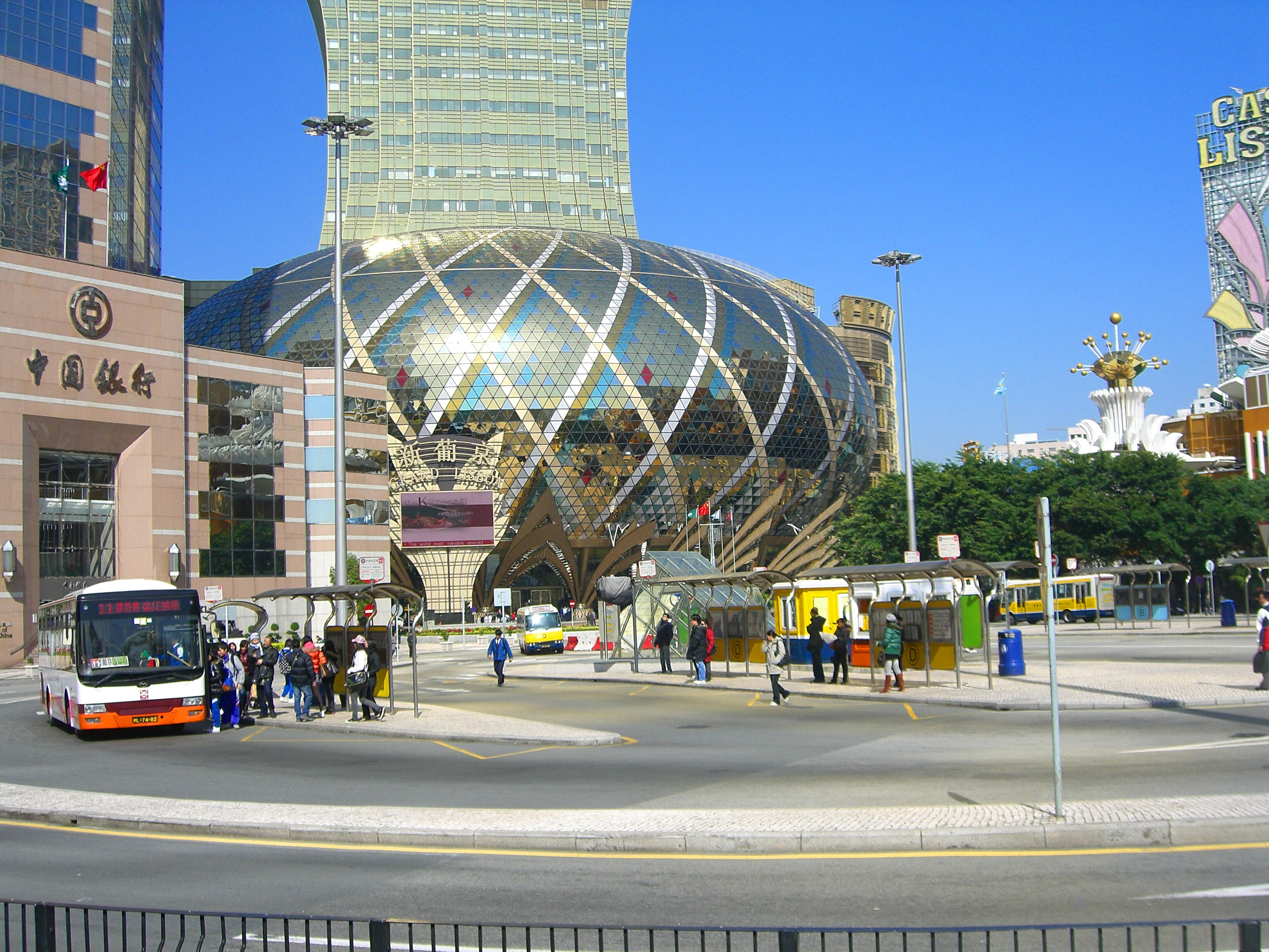 Área de Correspondência de Transportes Públicos da Praça F. Amaral